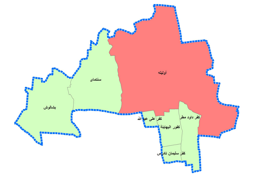 خريطة قرية اوليلة